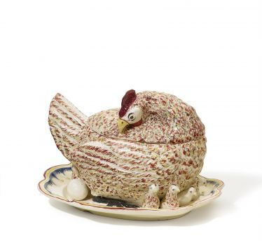 Poule en faience, Manufacture de Ferrière-la-Petite, France, ca. 1800